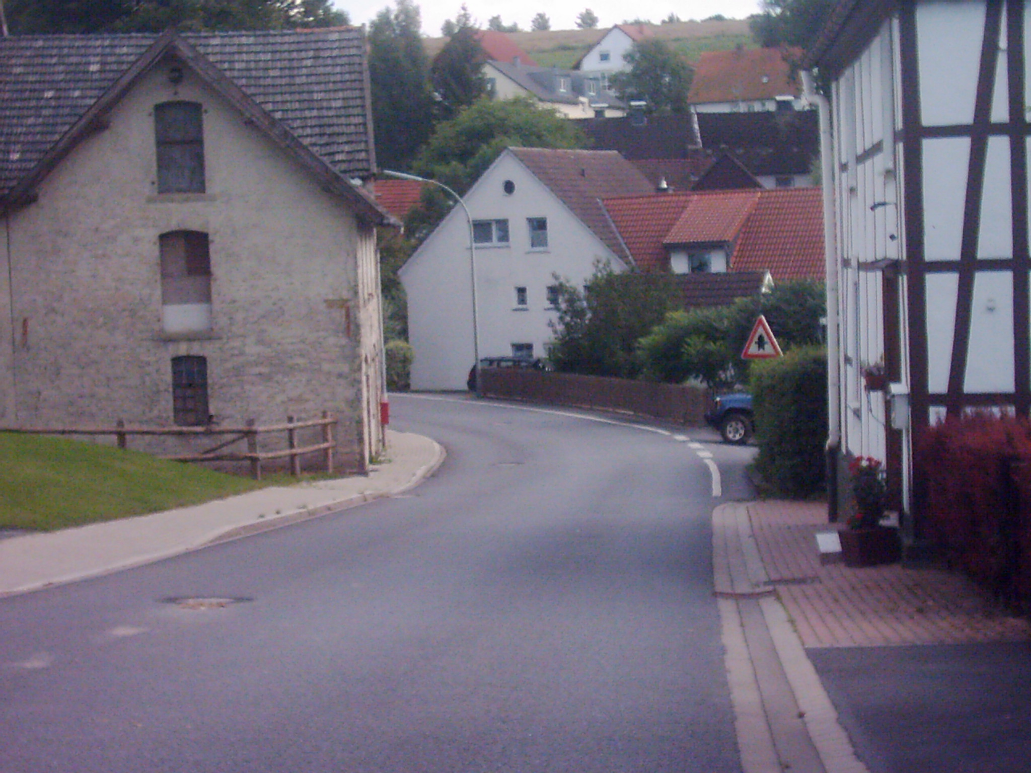 Wamel, oberes Dorf